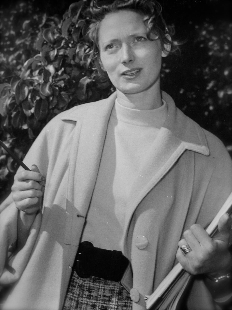 Annelise Hovmand